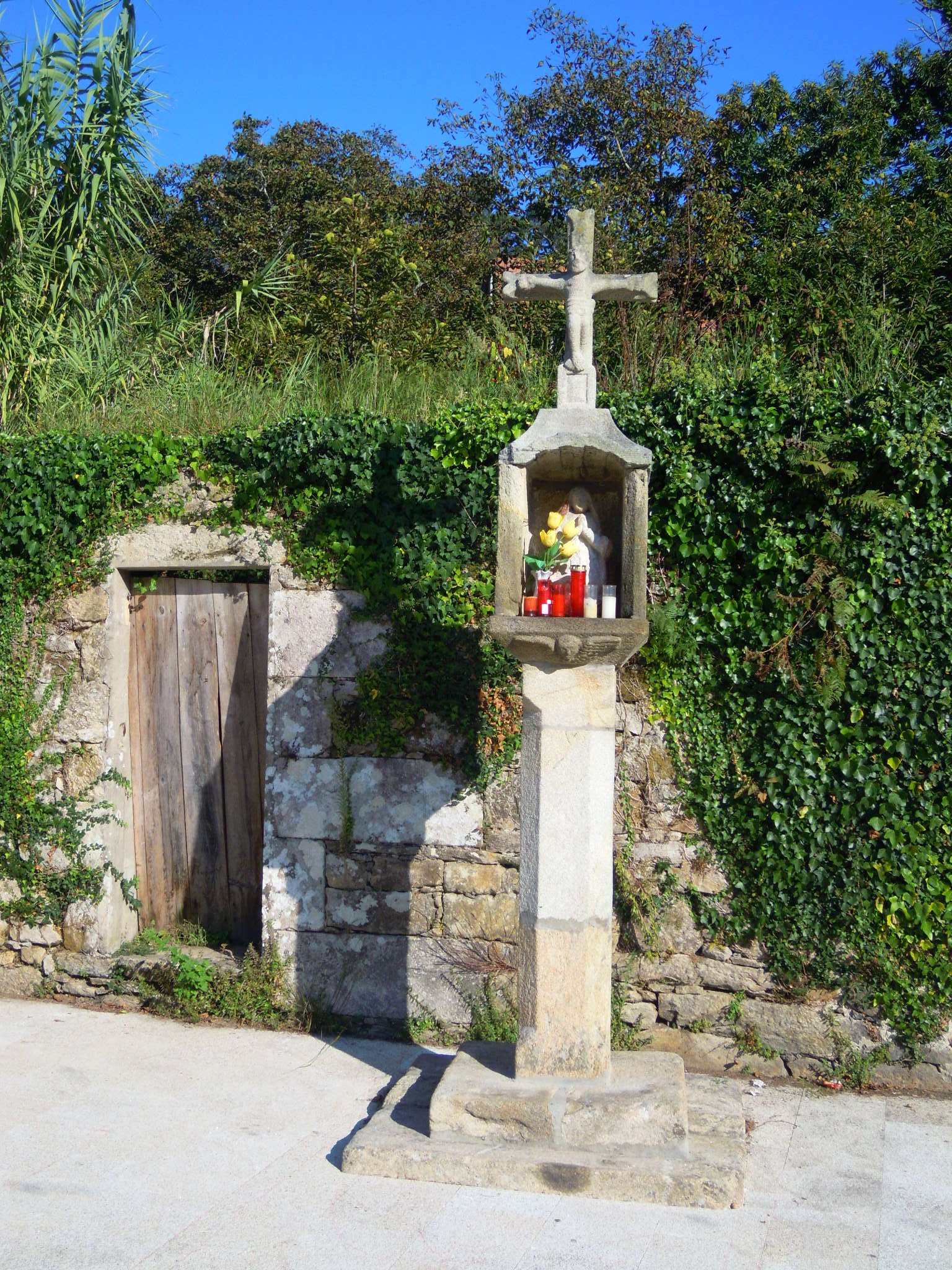 Cruceiro de capela xunto ao lavadoiro do lugar da Boliña Boiro.